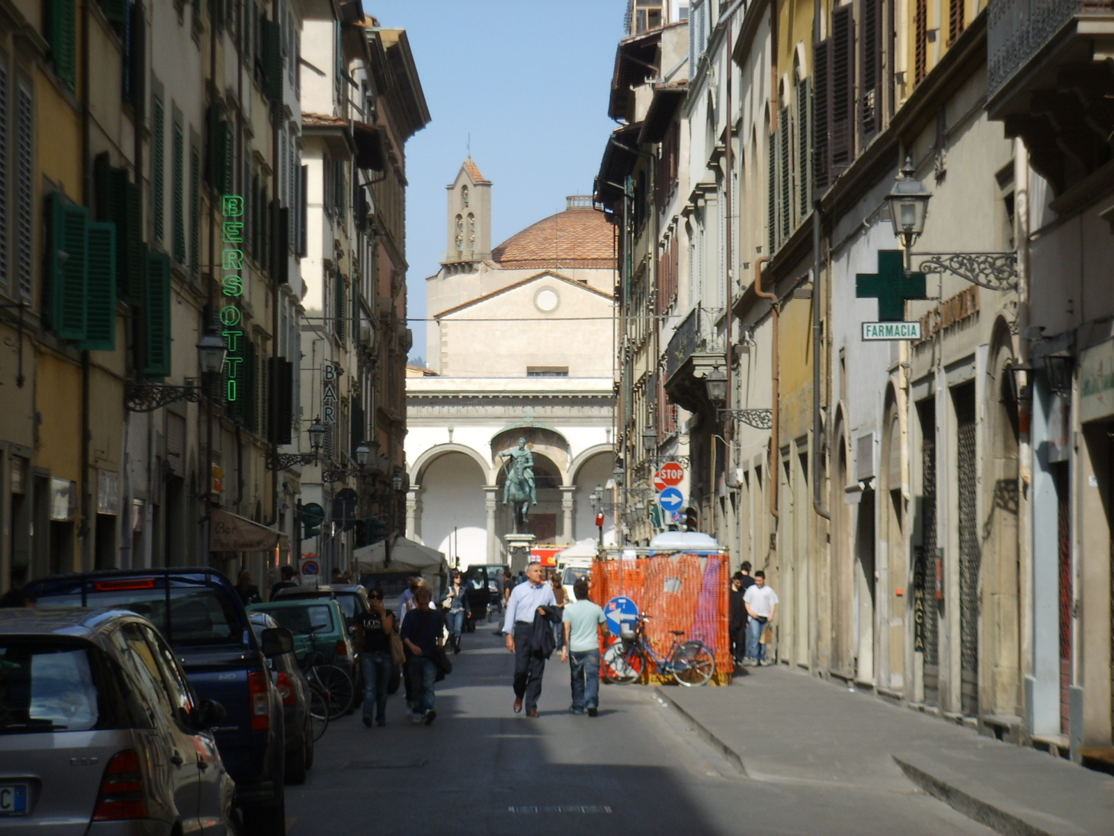 Via_dei_servi in Florence